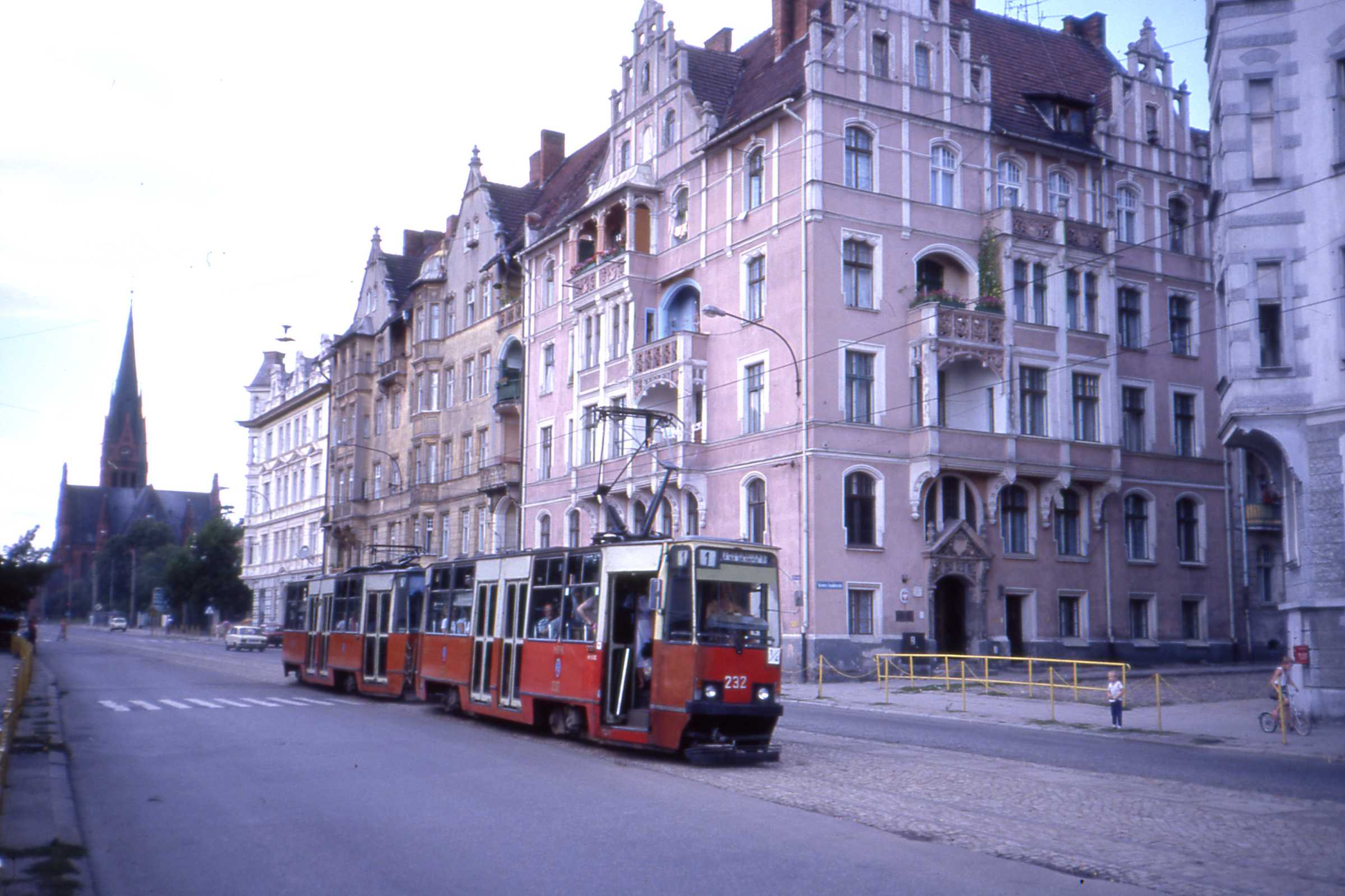 Konstal 805Na tram no 232 on Route 1 to Jakubskie